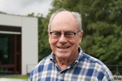 Foto di Philip L. Roe